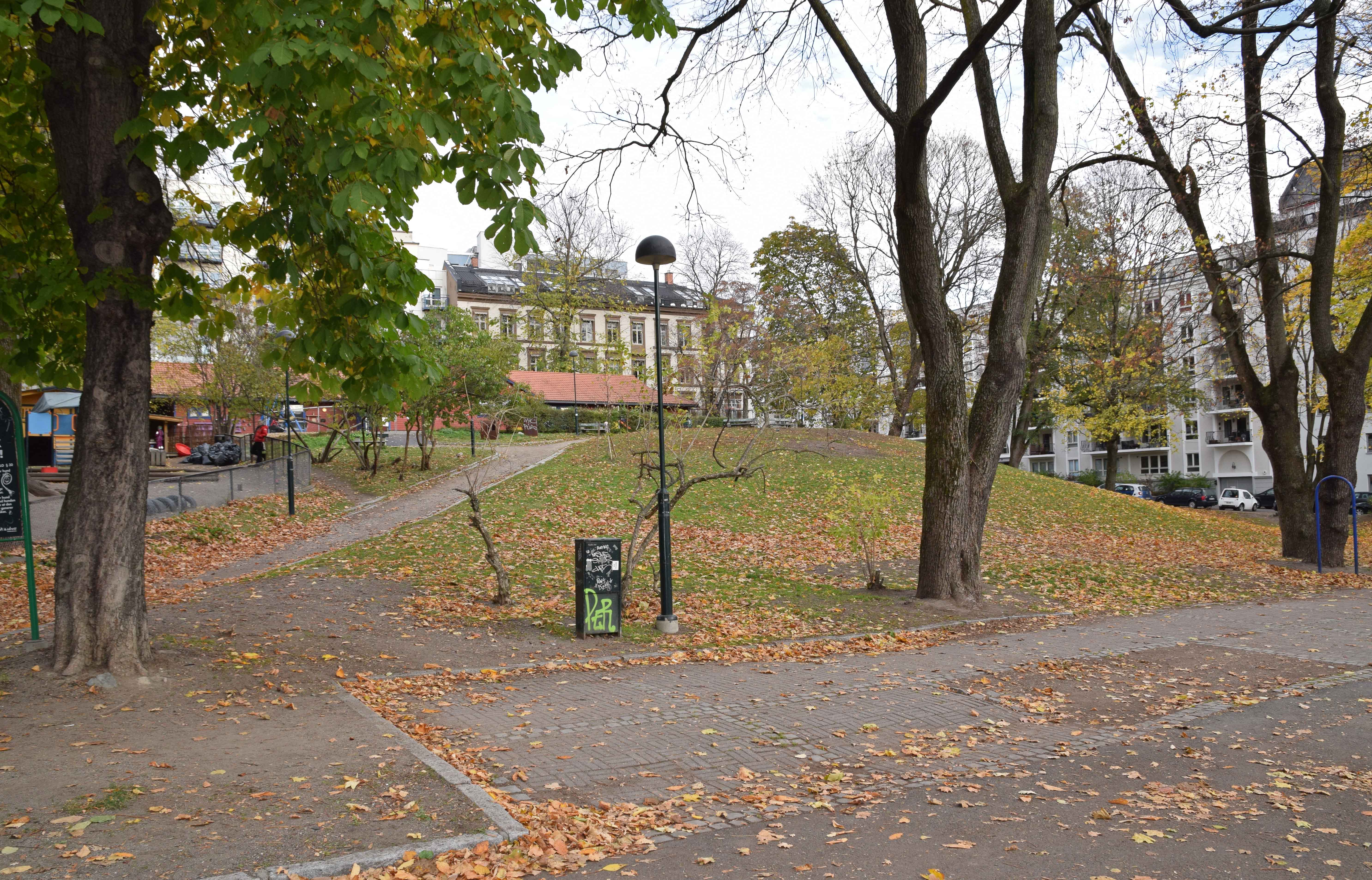 Ankerhagen sett fra krysset Observatoriegata / Parkveien